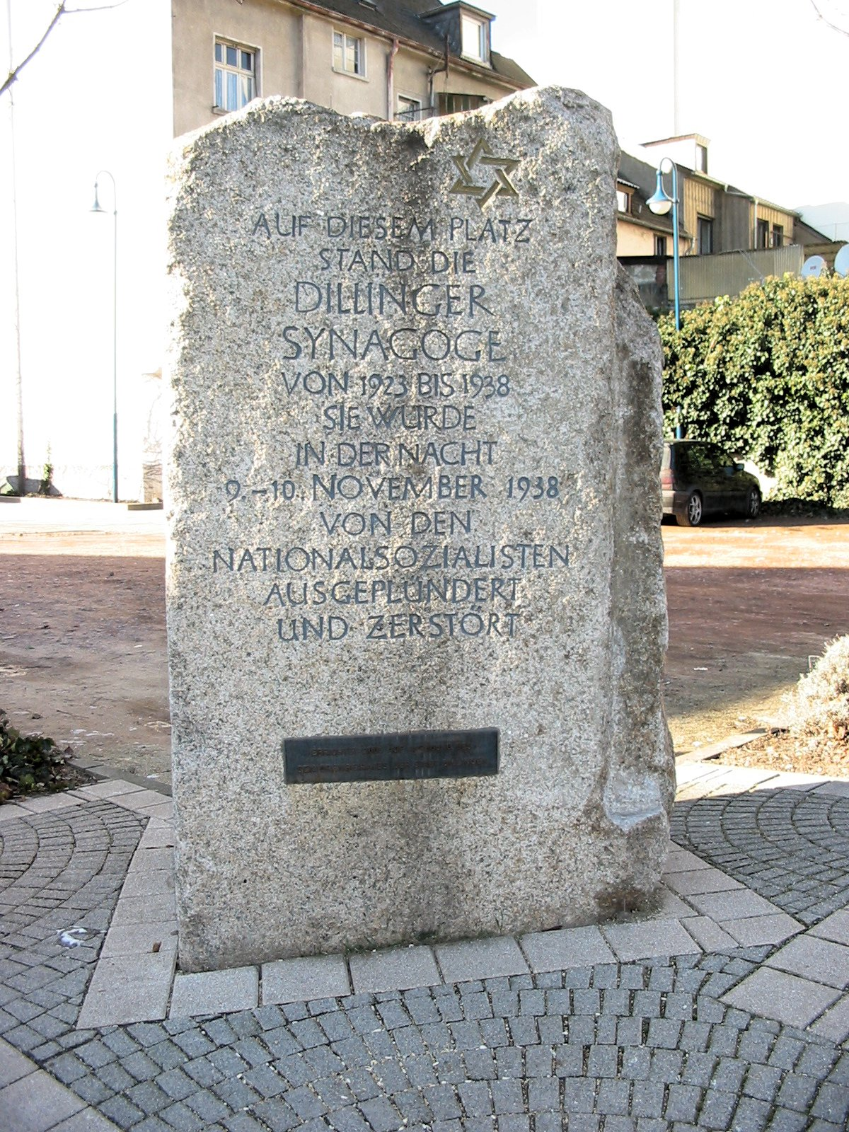 Gedenkstein der ehemaligen Synagoge in Dillingen